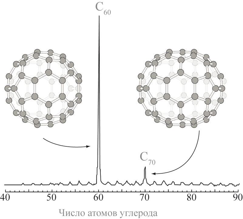 Масс-спектр углеродных кластеров, полученных при лазерном испарении графита. Основной пик соответствует моллекулам фуллерена C60, менее интенсивный пик — C70